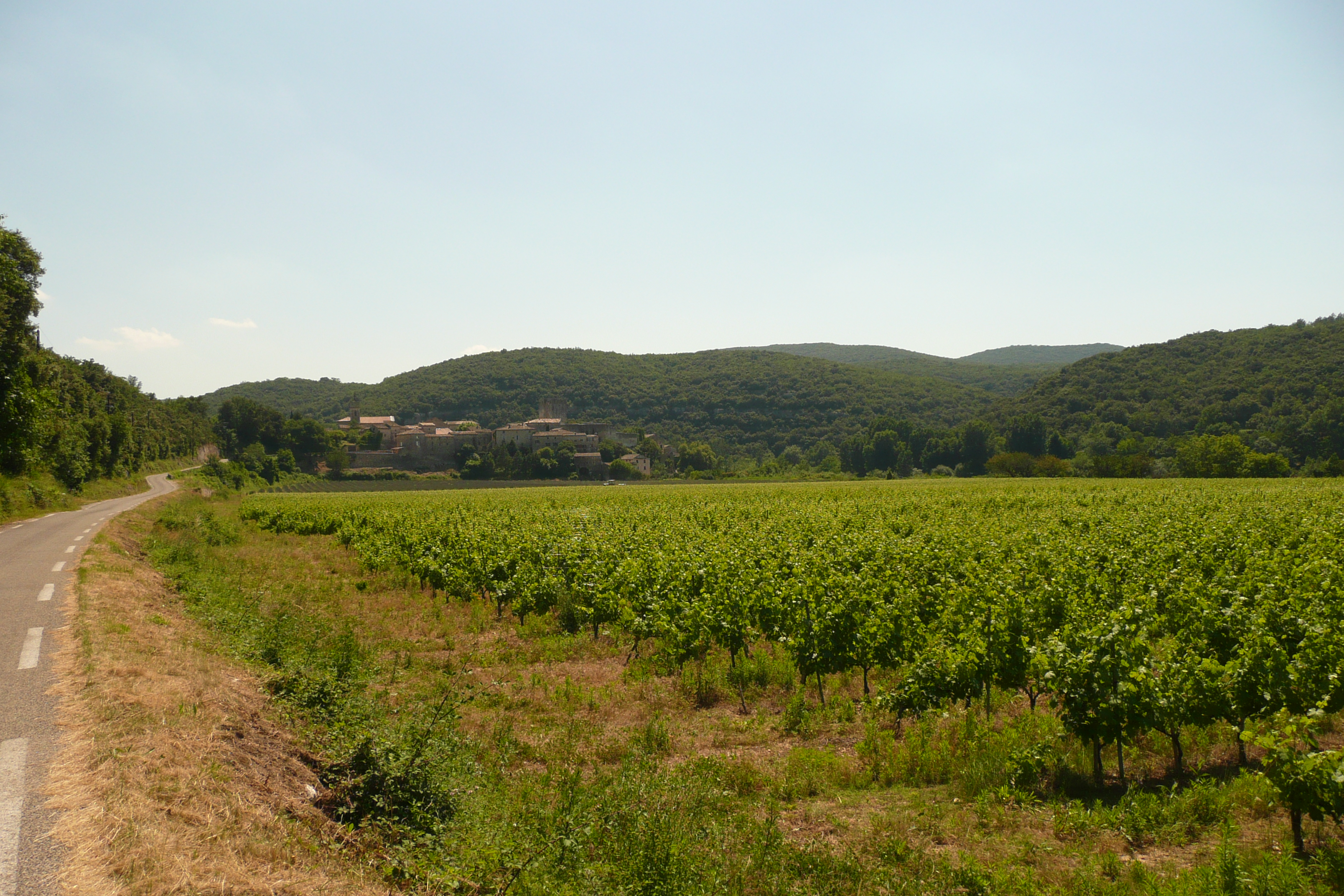 Vue d'ensemble de Montclus (Gard).